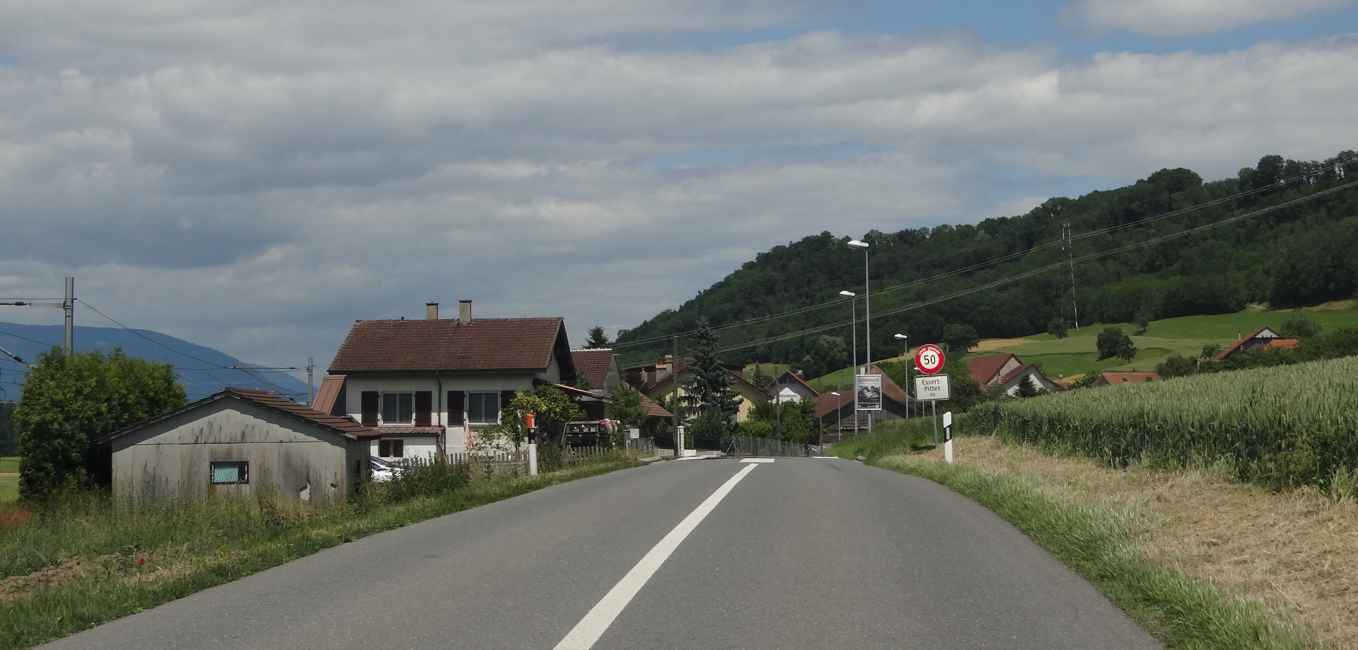 1435 Essert-Pittet, Switzerland